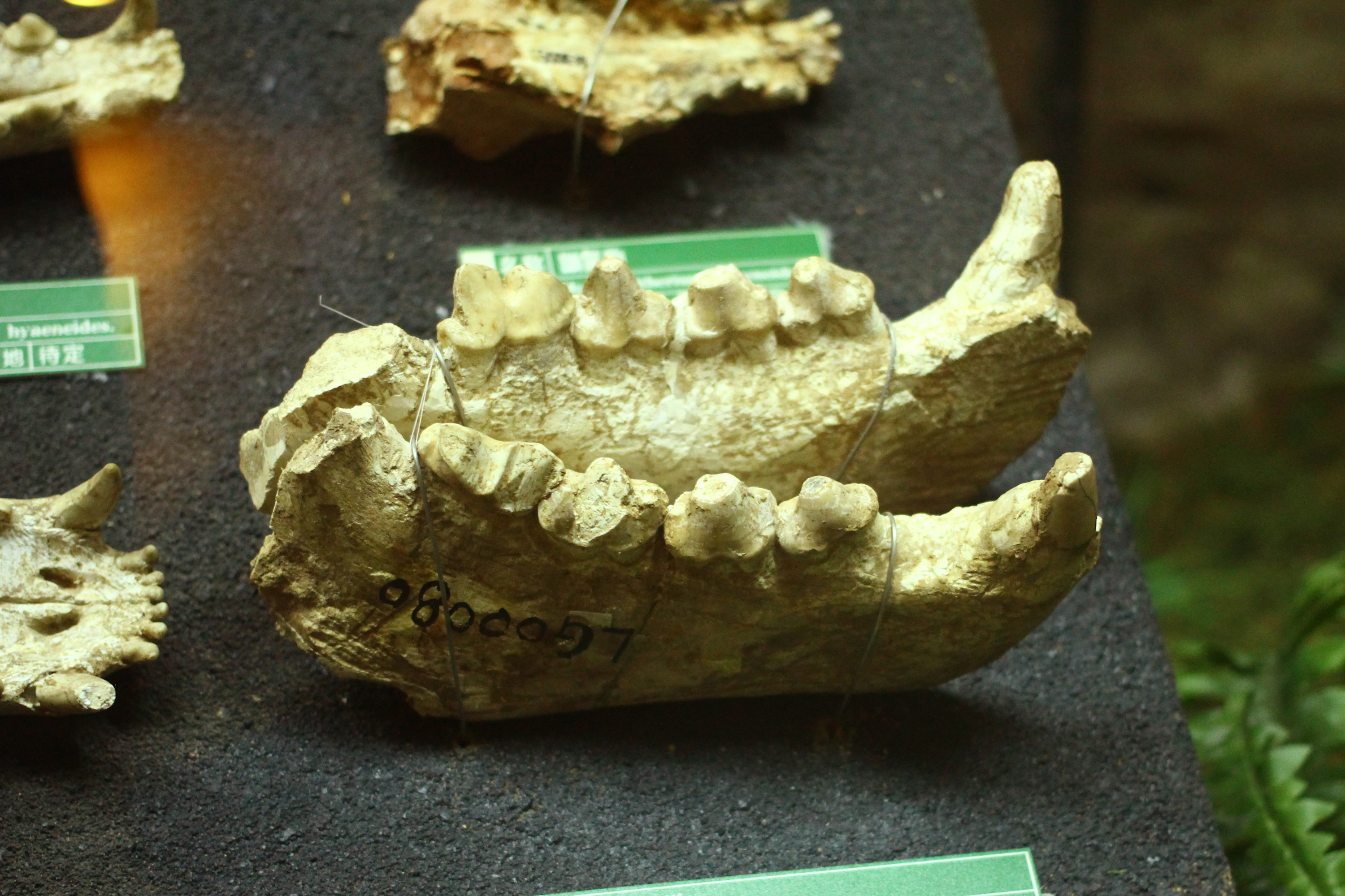 巨鬣狗 Dinocrocuta gigantea。中新世晚期-上新世早期。产地中国甘肃和政。